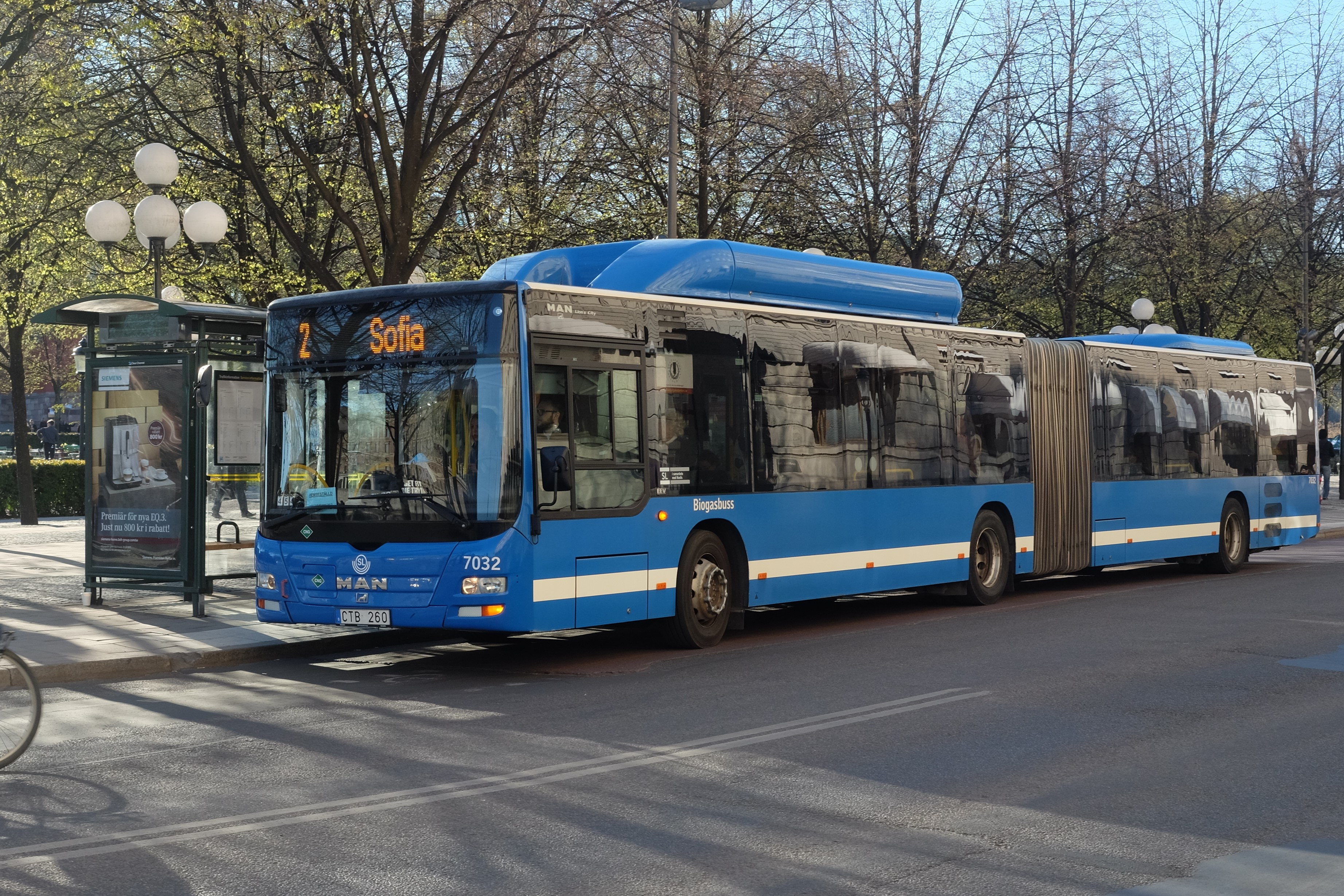 Keolis 7032 på SLs stomlinje 2 vid Karl den XII:s torg i Stockholm